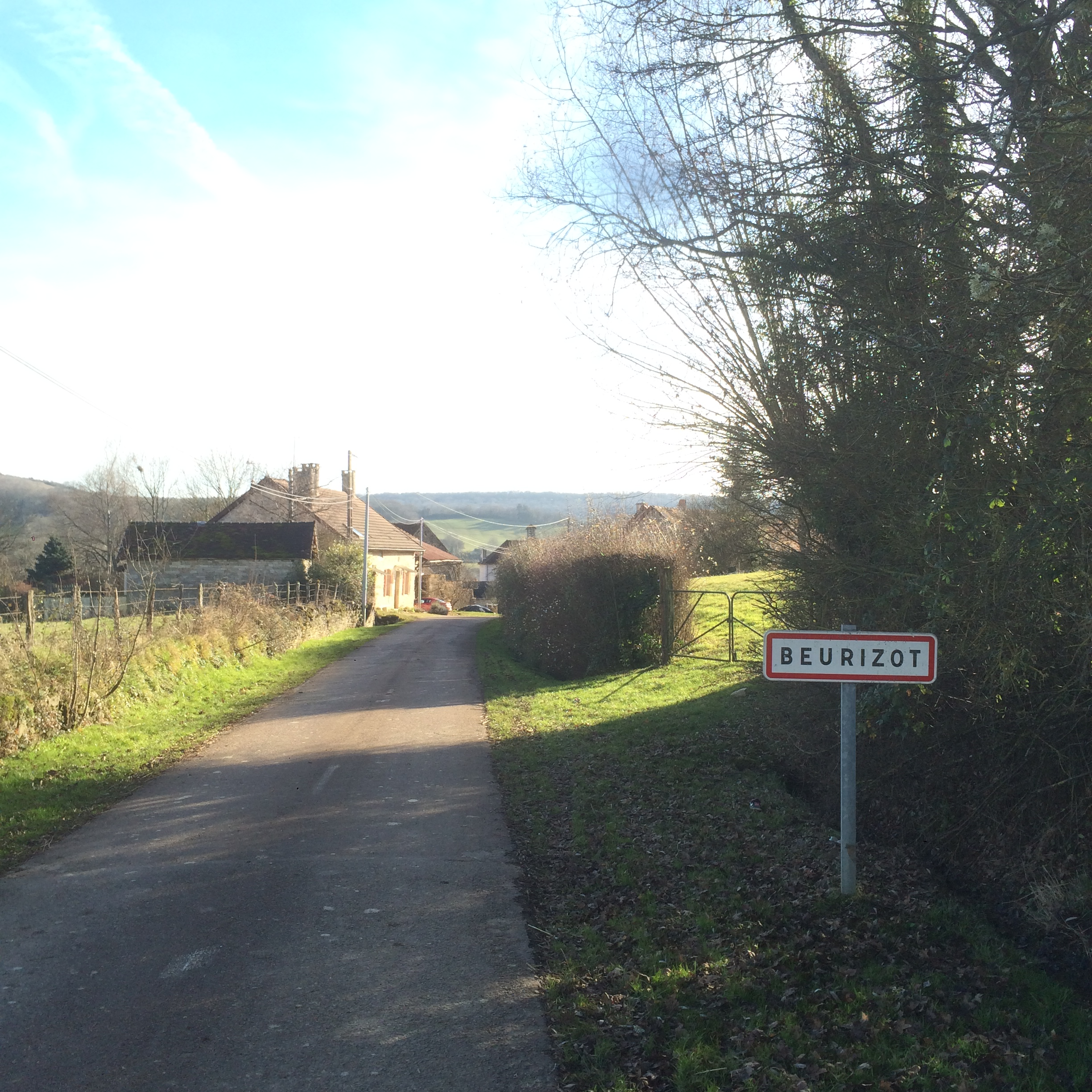 Entrée de Beurizot, France (21350).